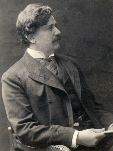 Stephan Licht (1860 - 1932), Rakouský a český advokát a politik německé národnosti.